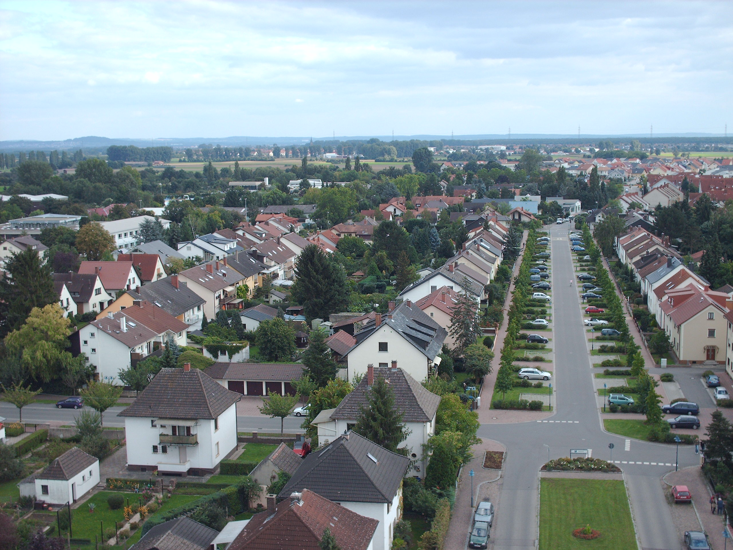 Dieses Foto ist auf der Aussichtsplattform des Wasserturms in Hockenheim entstanden während des Tag des offenen Denkmals in Baden-Württemberg im Jahr 2008.